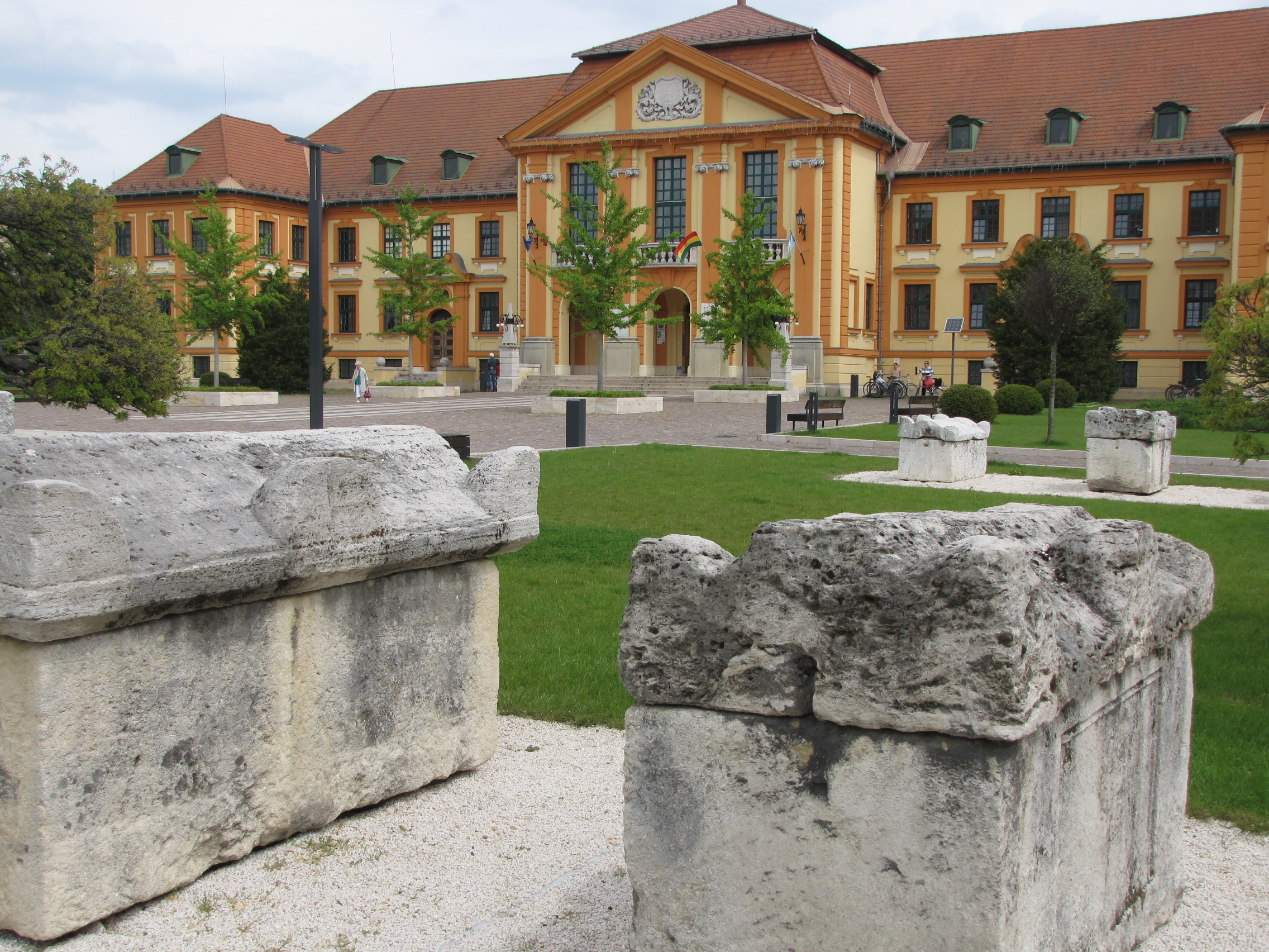 Hungary, Komárom, a Városháza a Szabadság téren